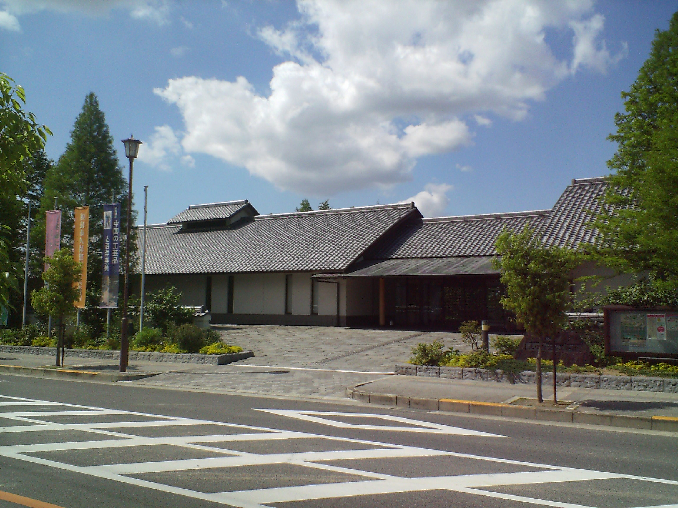 投稿者自身が『和泉市久保惣記念美術館』（大阪府和泉市内田町3-6-12）を現地で撮影。【前回の撮影（2006年（平成18年）10月09日（月））では、カメラの性能が悪く、写真が不鮮明だったので、新しく撮りなおした。】 2007年（平成19年）05月20日（日）撮影 撮影機材：某メーカー製デジタルスチルカメラ 撮影者：阪神強いな